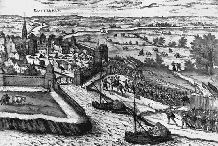 Afbeelding van de inval van de Spanjaarden in Rotterdam op 9 april 1572 via de Oostpoort. Prent is verschenen in het werk van Frans Hogenberg in 1640.